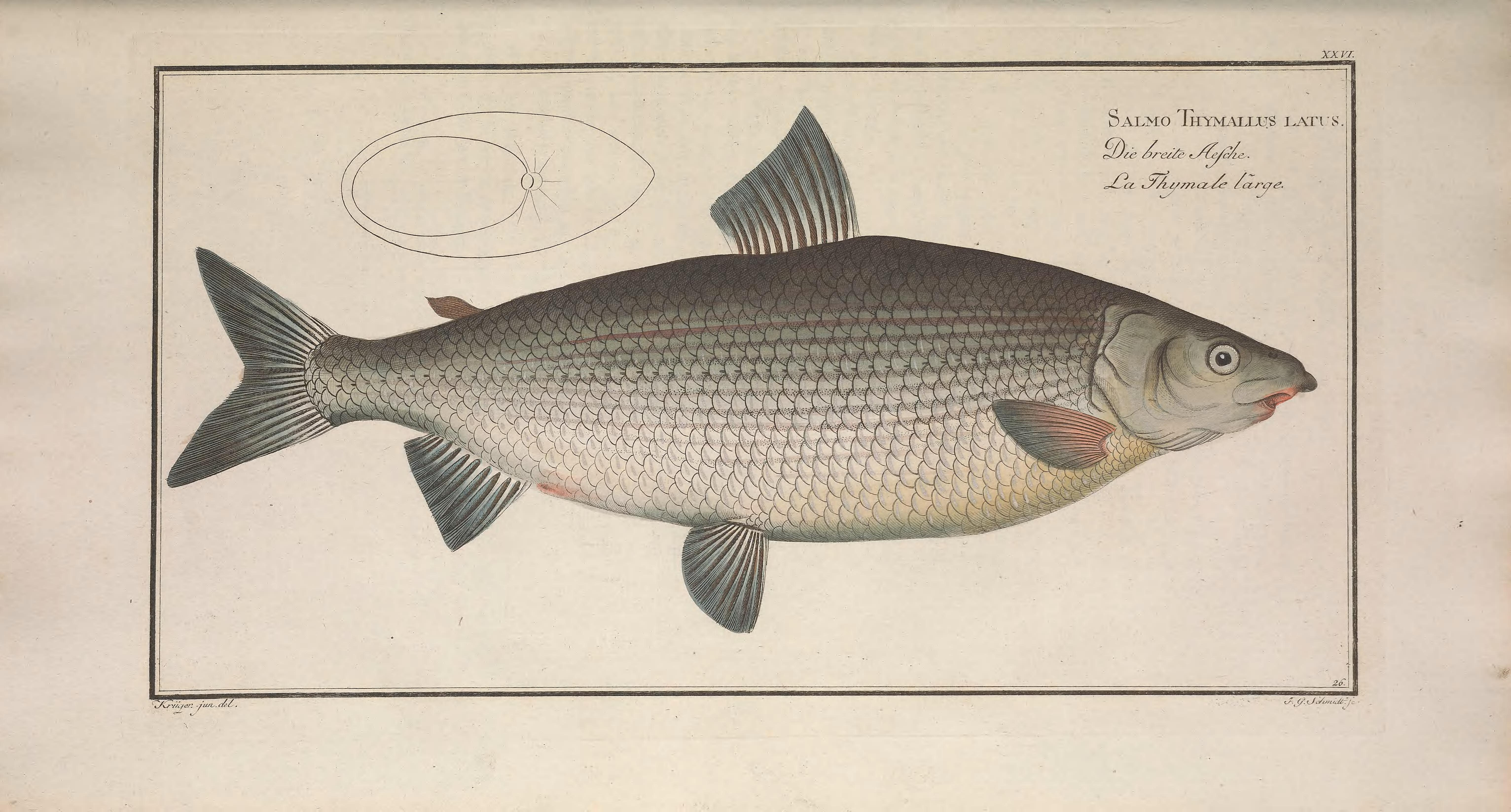 Coregonus oxyrinchus syn. Salmo thymallus latusIchtyologie, ou, Histoire naturelle, générale et particulière des poissons : avec des figures enluminées, dessinées d'après nature /